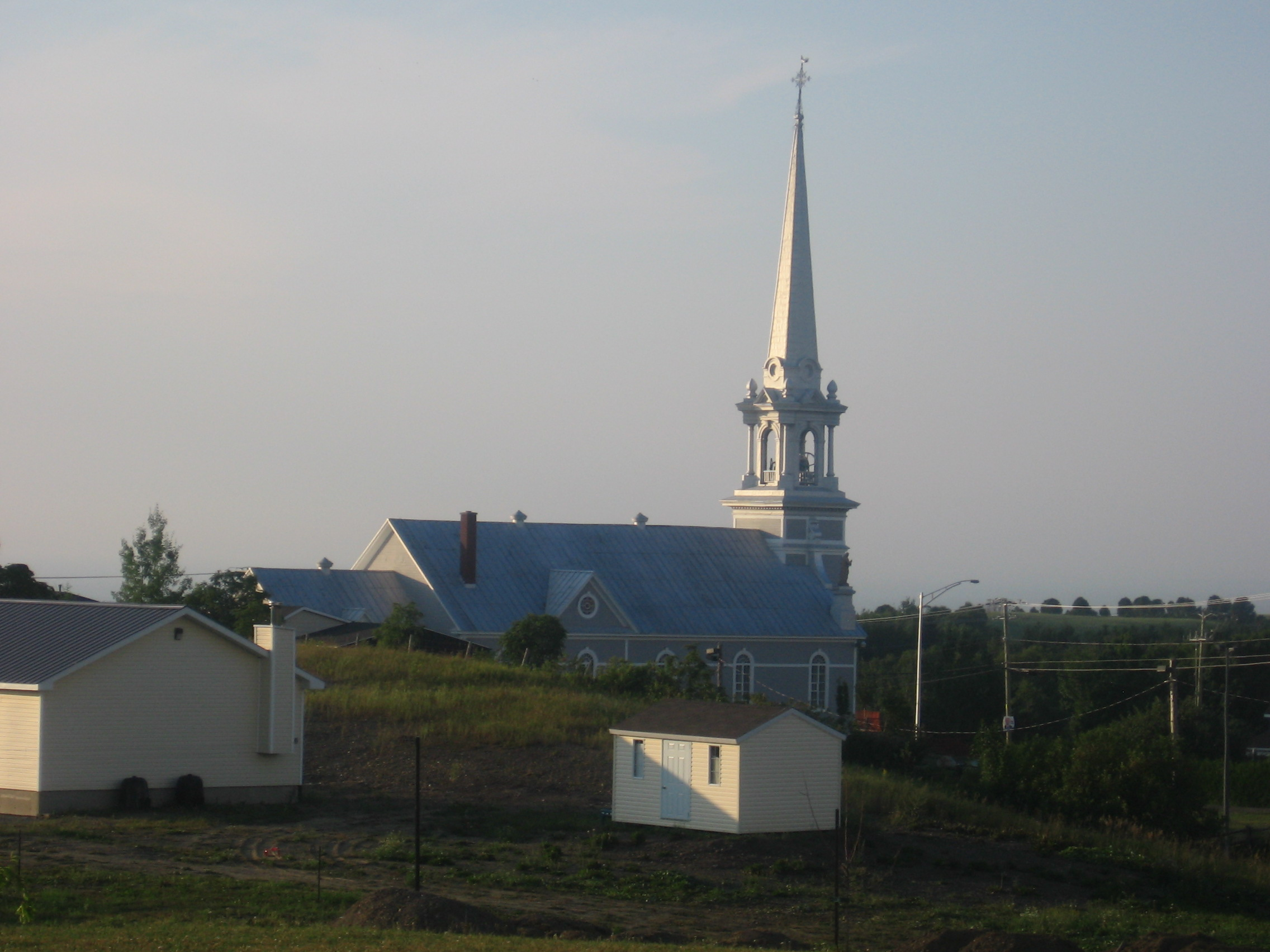 Église de Saint-Joseph-de-Lepage